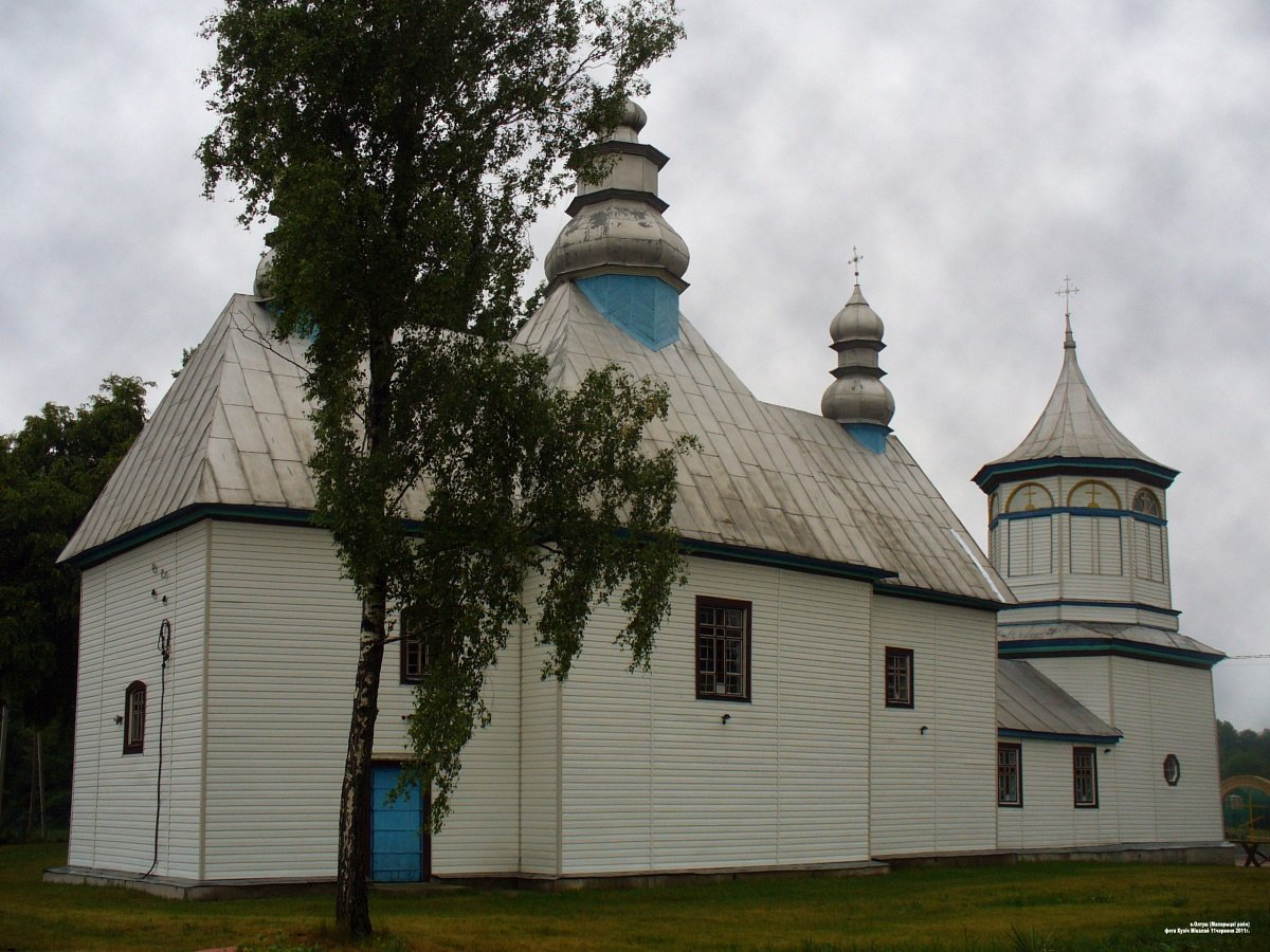 Олтуш. Спаса-Праабражэнская царква з сайдынгам